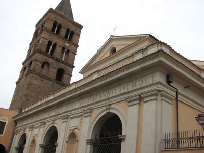 Duomo di Tivoli